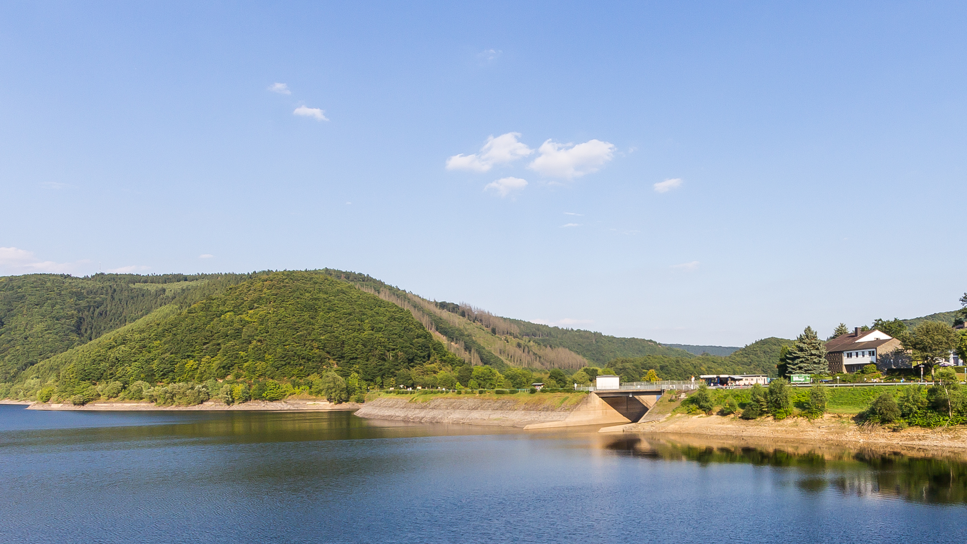 Paulushofdamm. Im Vordergrund der Rurstausee. Links der Honigberg